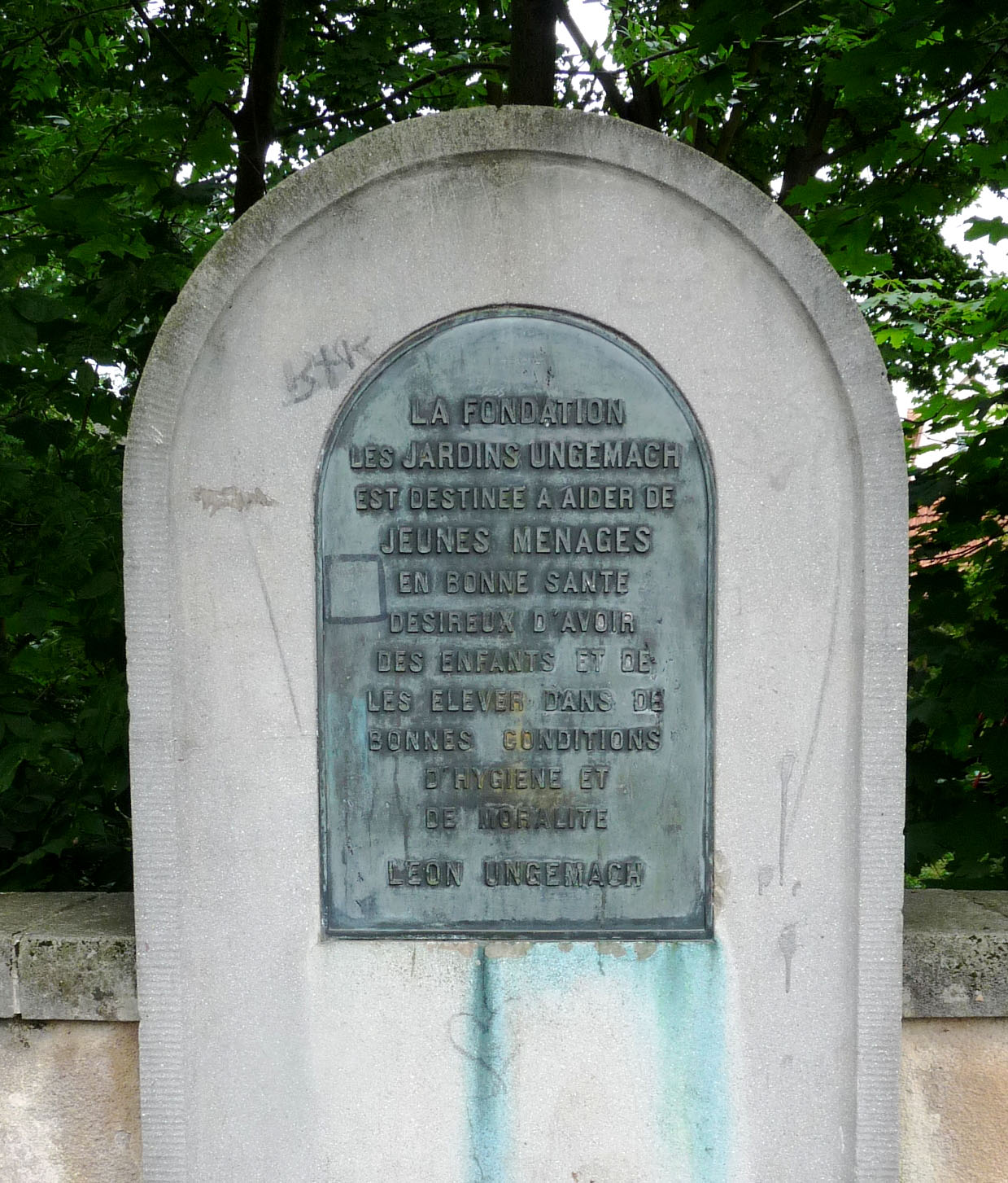 Cité-jardin Ungemach à Strasbourg, créée en 1923 par Charles-Léon Ungemach (1844-1928)